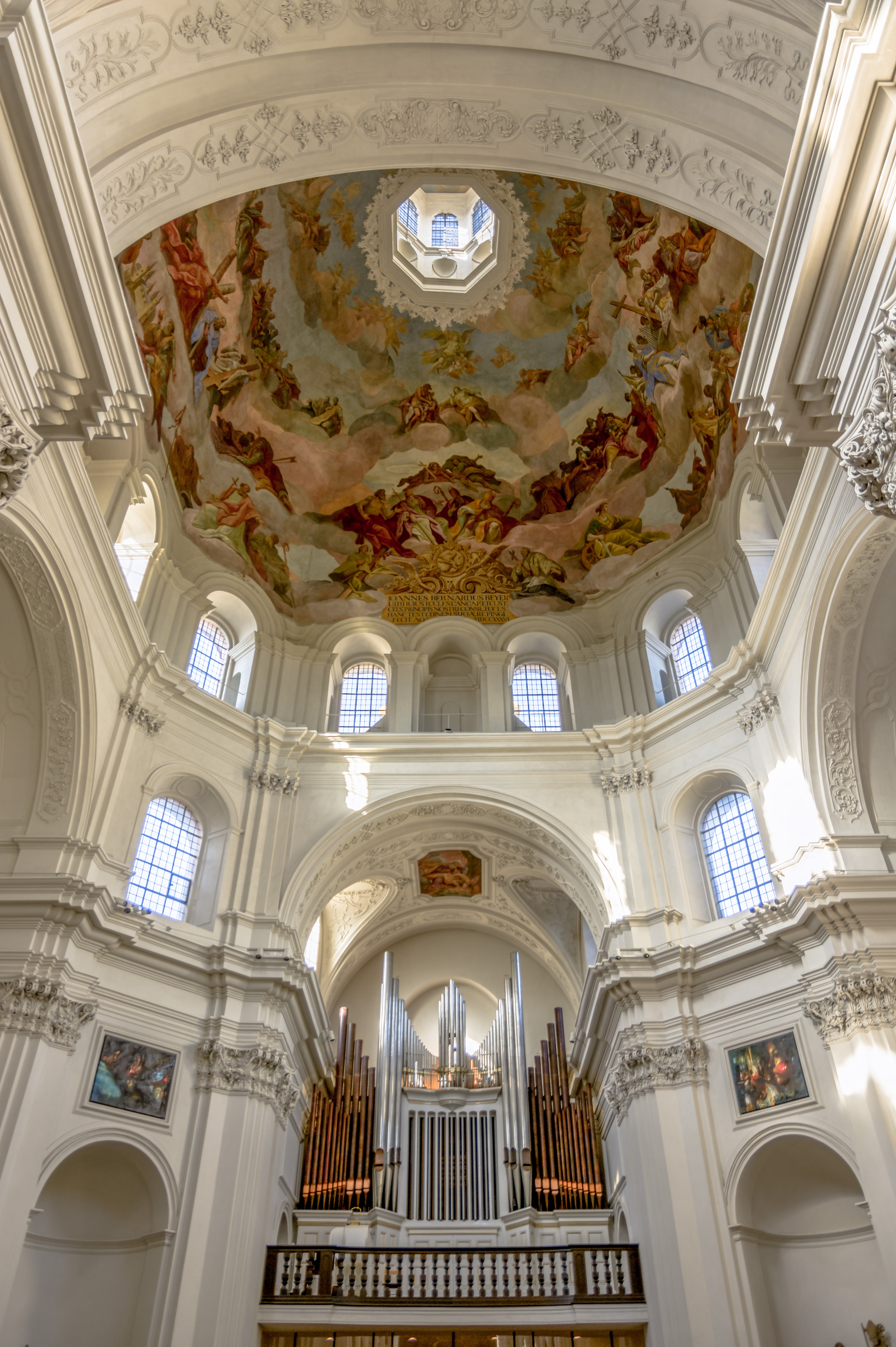 Würzburg NeumünsterkircheThis is a photograph of an architectural monument.